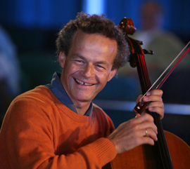 Le violoncelliste Dominique de Williencourt en 2006.